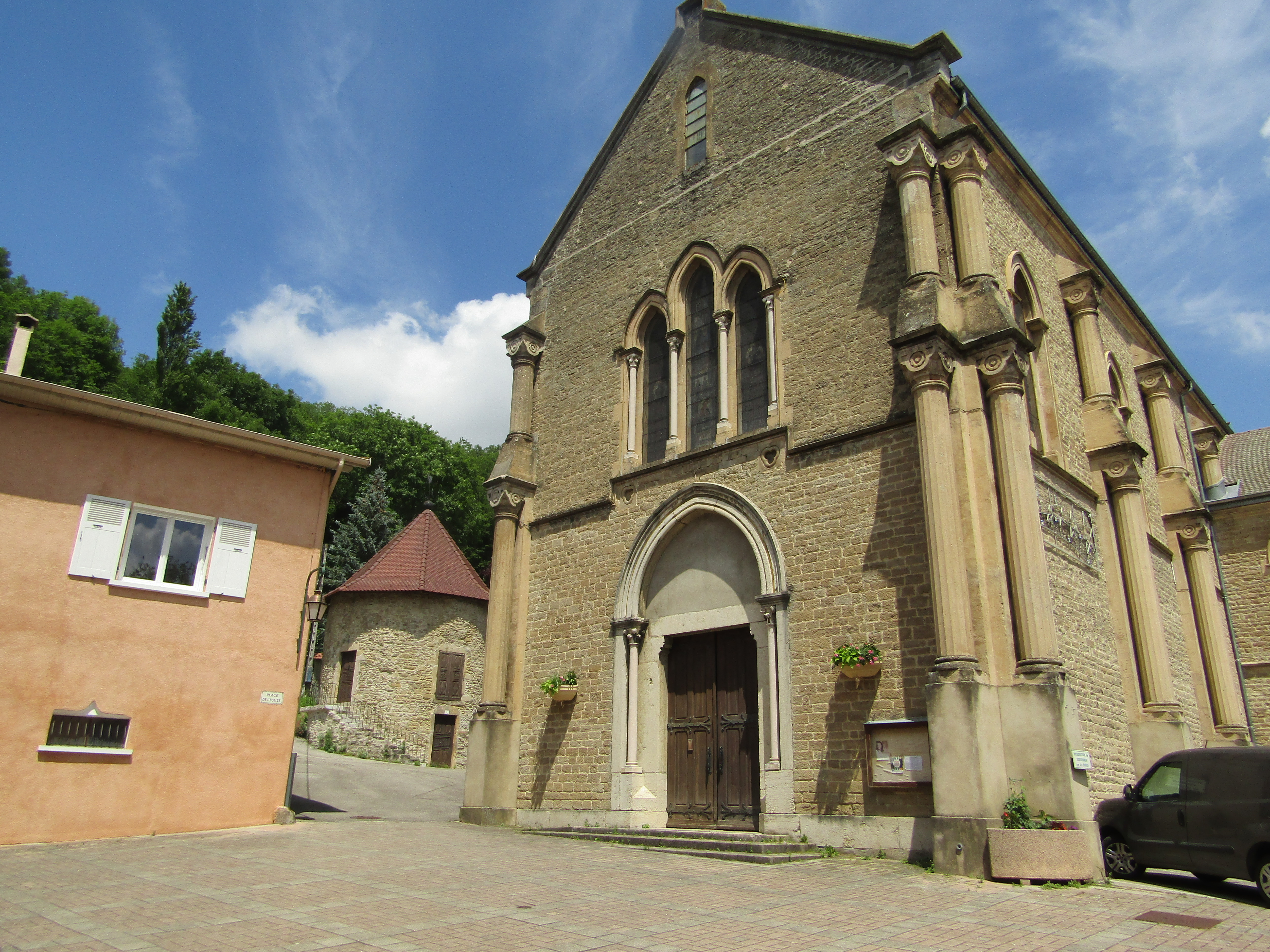 Porche de l'église de Cessieu en 2019